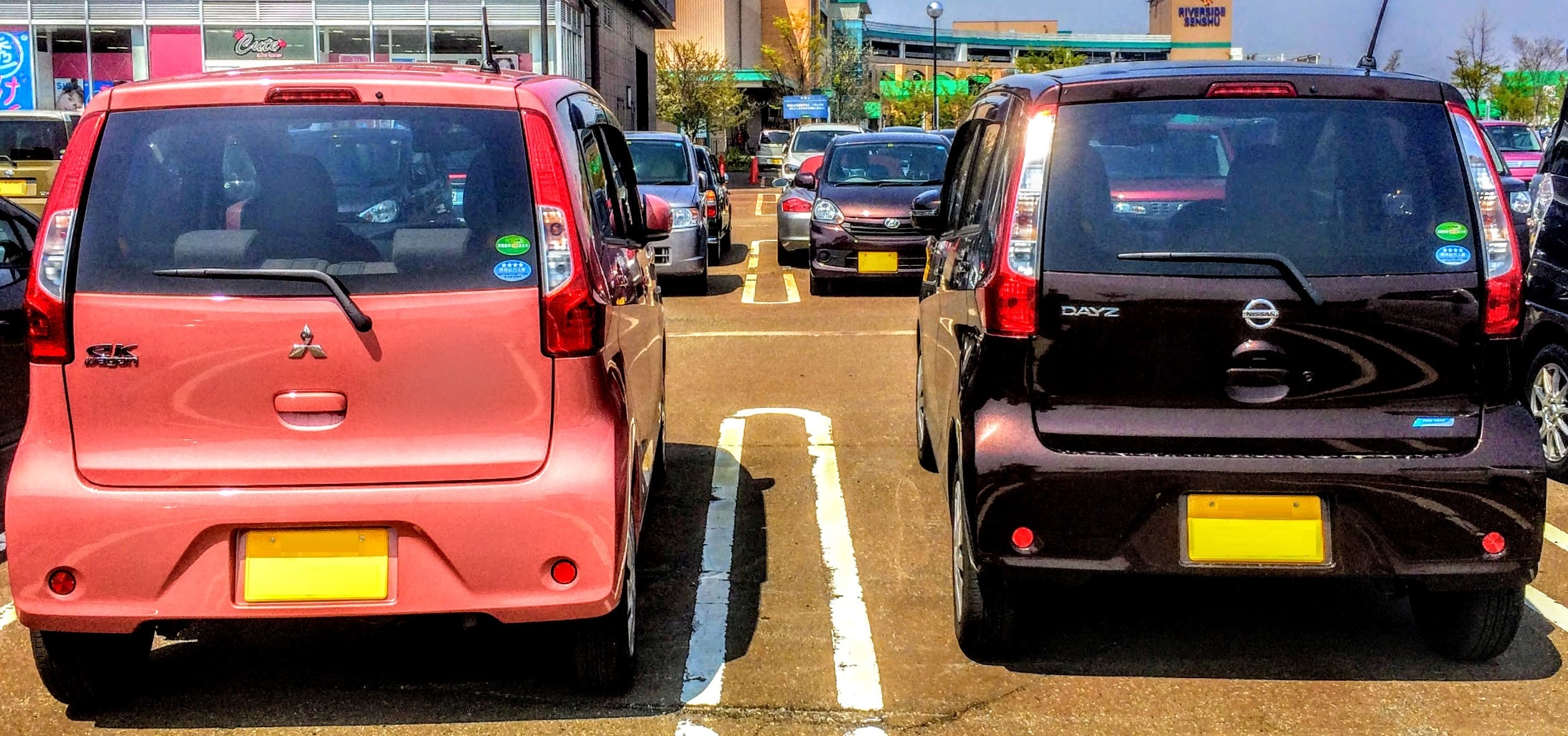 三菱EKワゴンと日産デイズ